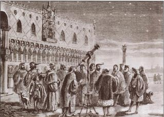 ദൂരദർശിനിയുമായി ഗലീലിയോ വെനിസിലെത്തിയപ്പോൾ